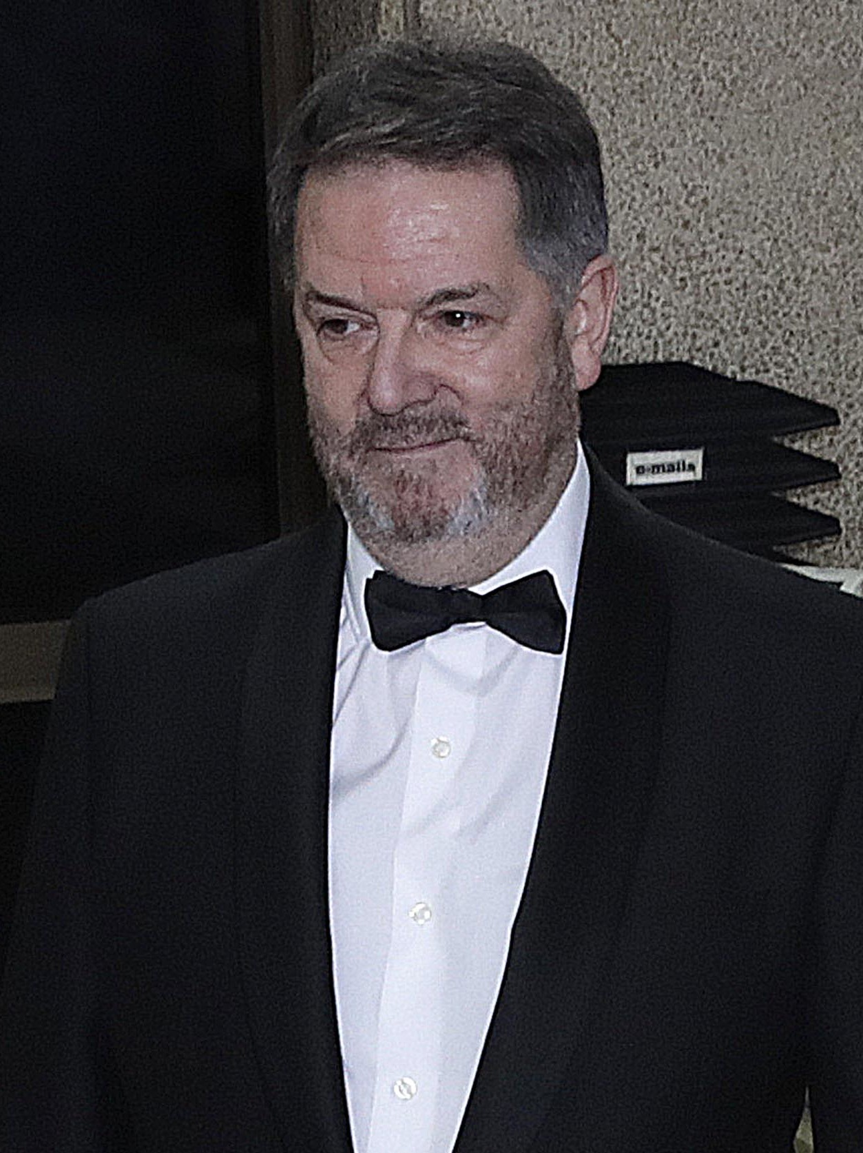 En los Premios Mariano de Cavia, Luca de Tena y Mingote 2016 de ABC, uno de los premios más prestigiosos de la prensa en España.